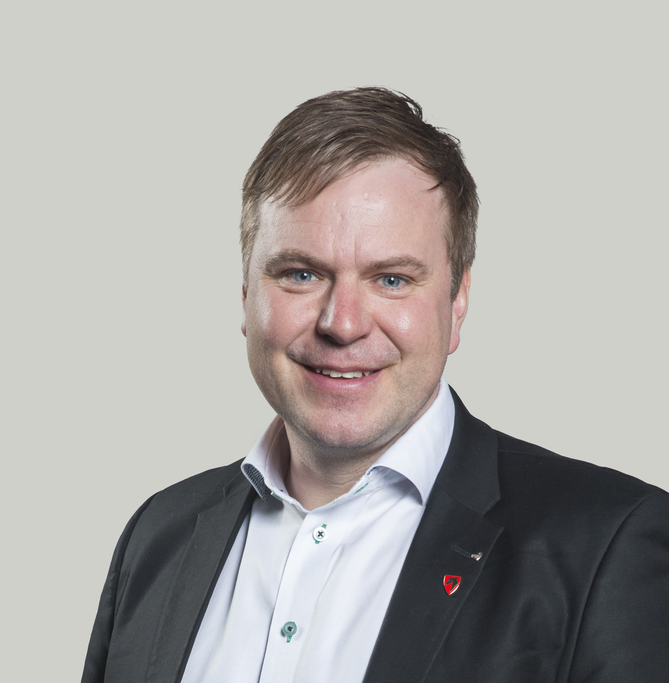 Portretter, Venstre LM 2015. Alfred Bjørlo, ordfører i Eid kommune Foto: Jo Straube / Venstre